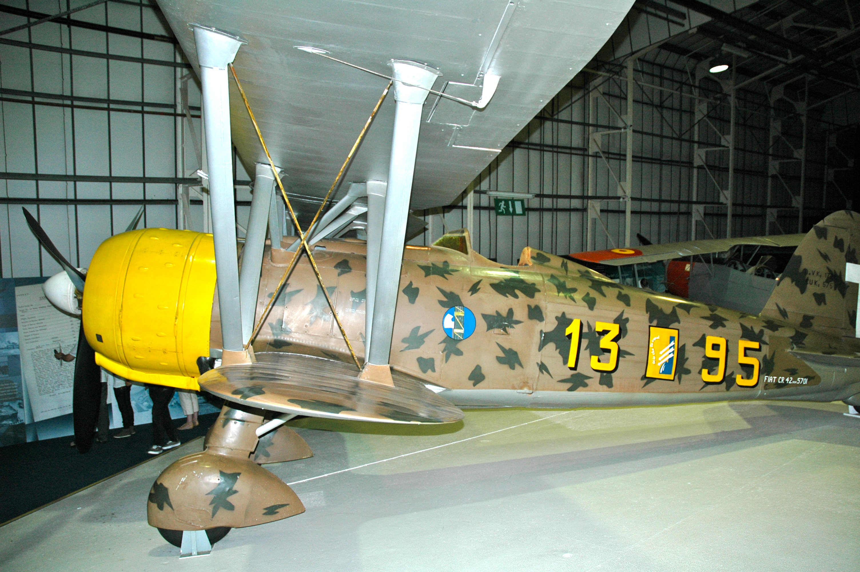 Vista laterale del Fiat C.R. 42 esposto al RAF Museum Hendon, Londra, Regno Unito